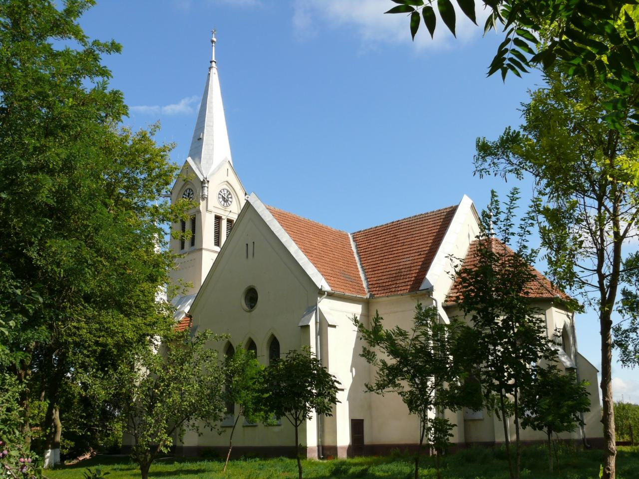 A nagysármási református templom 1901-1902 között épült Czigler Győző műgyetemi tanár tervei alapján